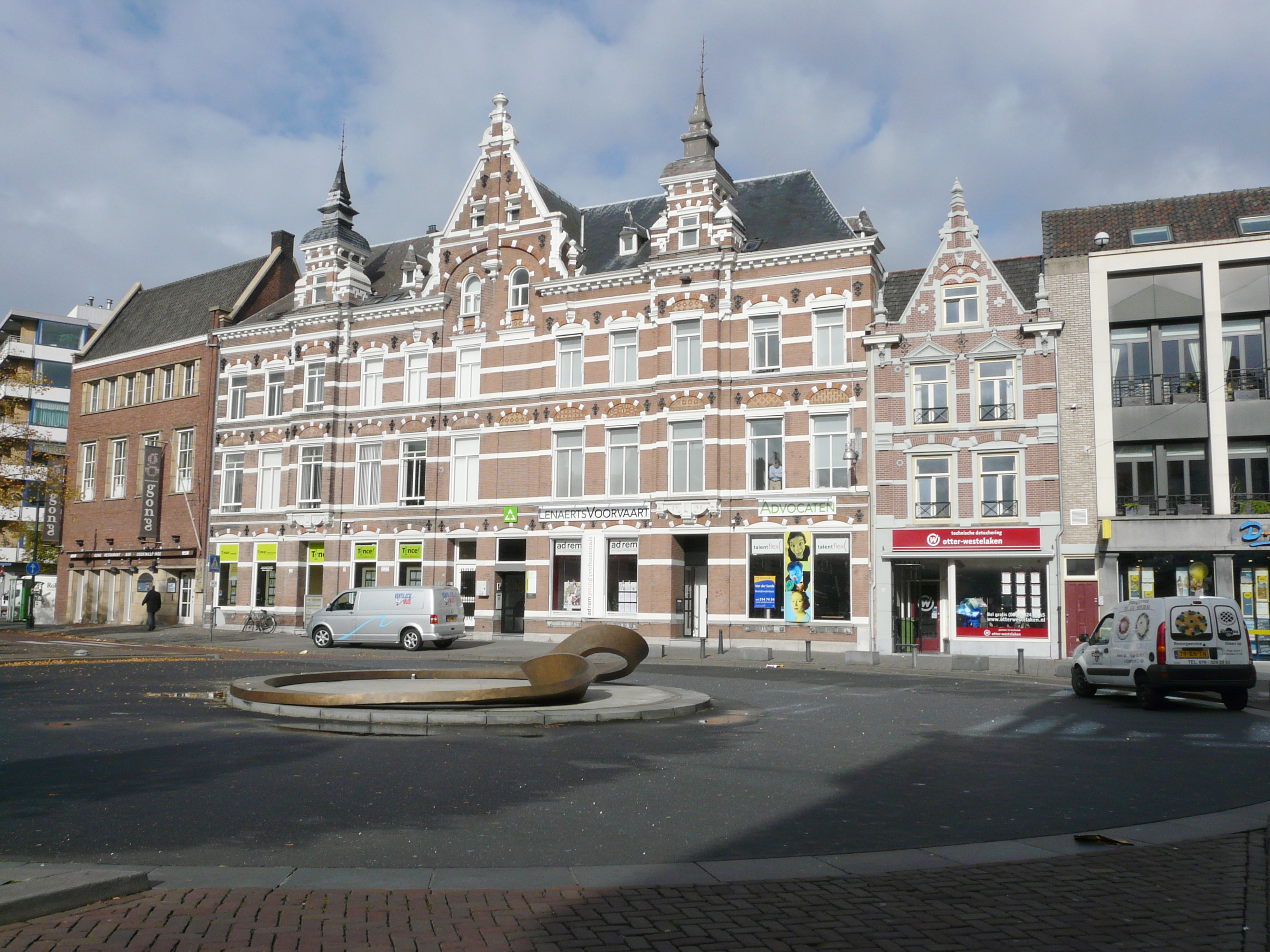 Van Coothplein in Breda Centrum